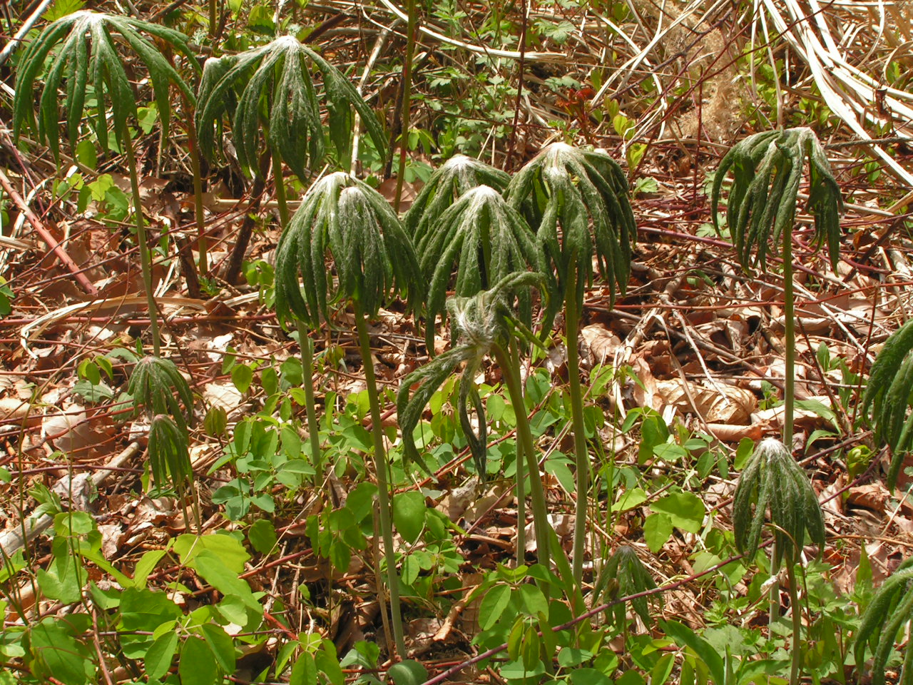 Syneilesis palmata